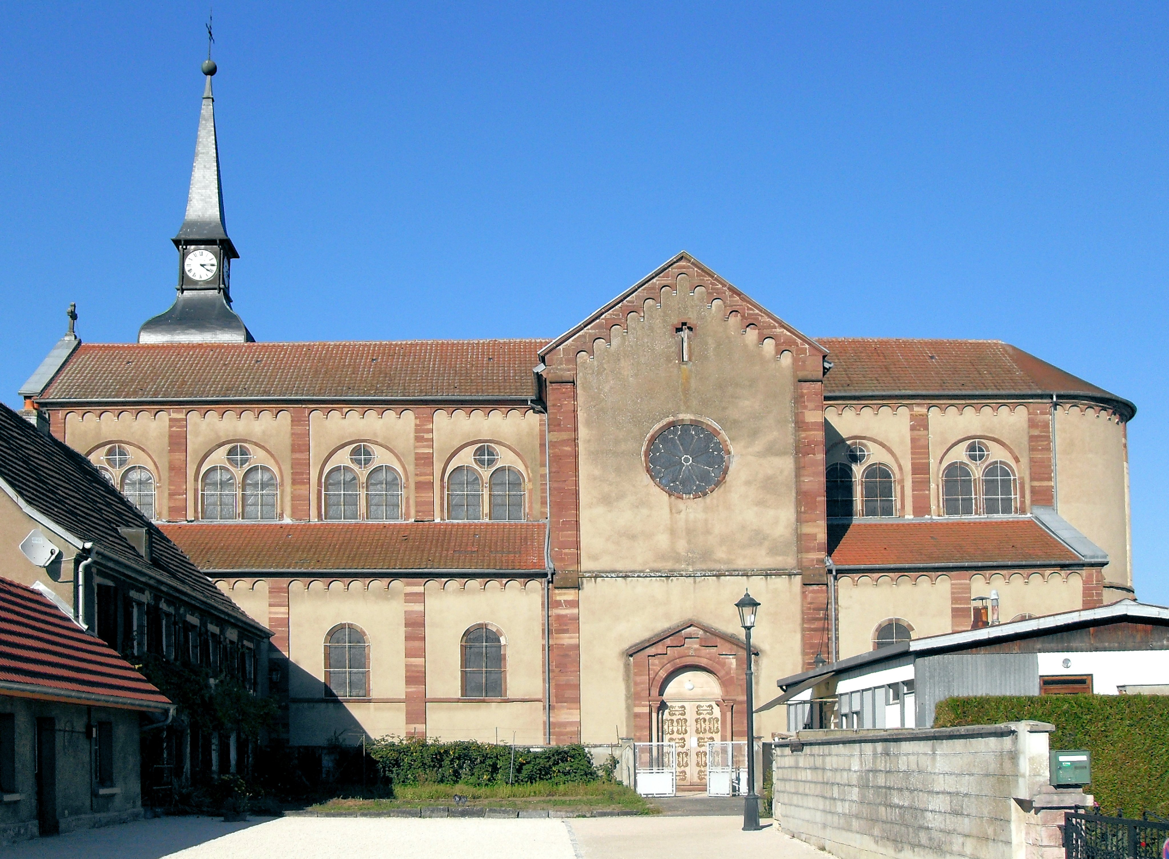 L'église Saint-Martin à Grandvillars